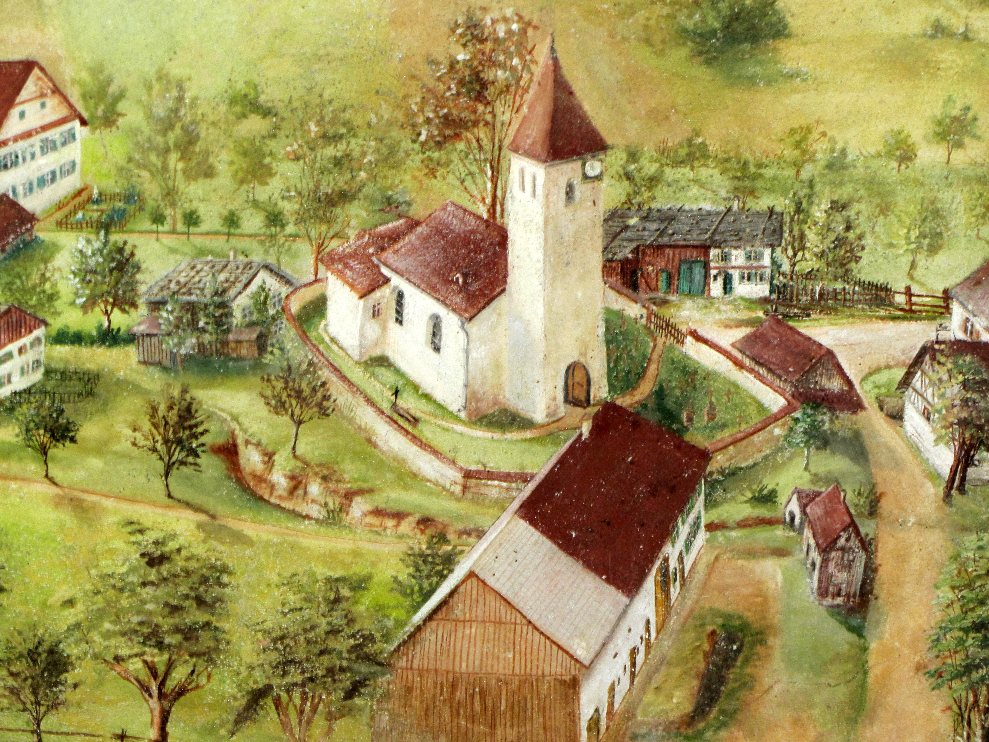 Dorfkapelle St. Georg (Eschach) - Detail vom Deckengemälde